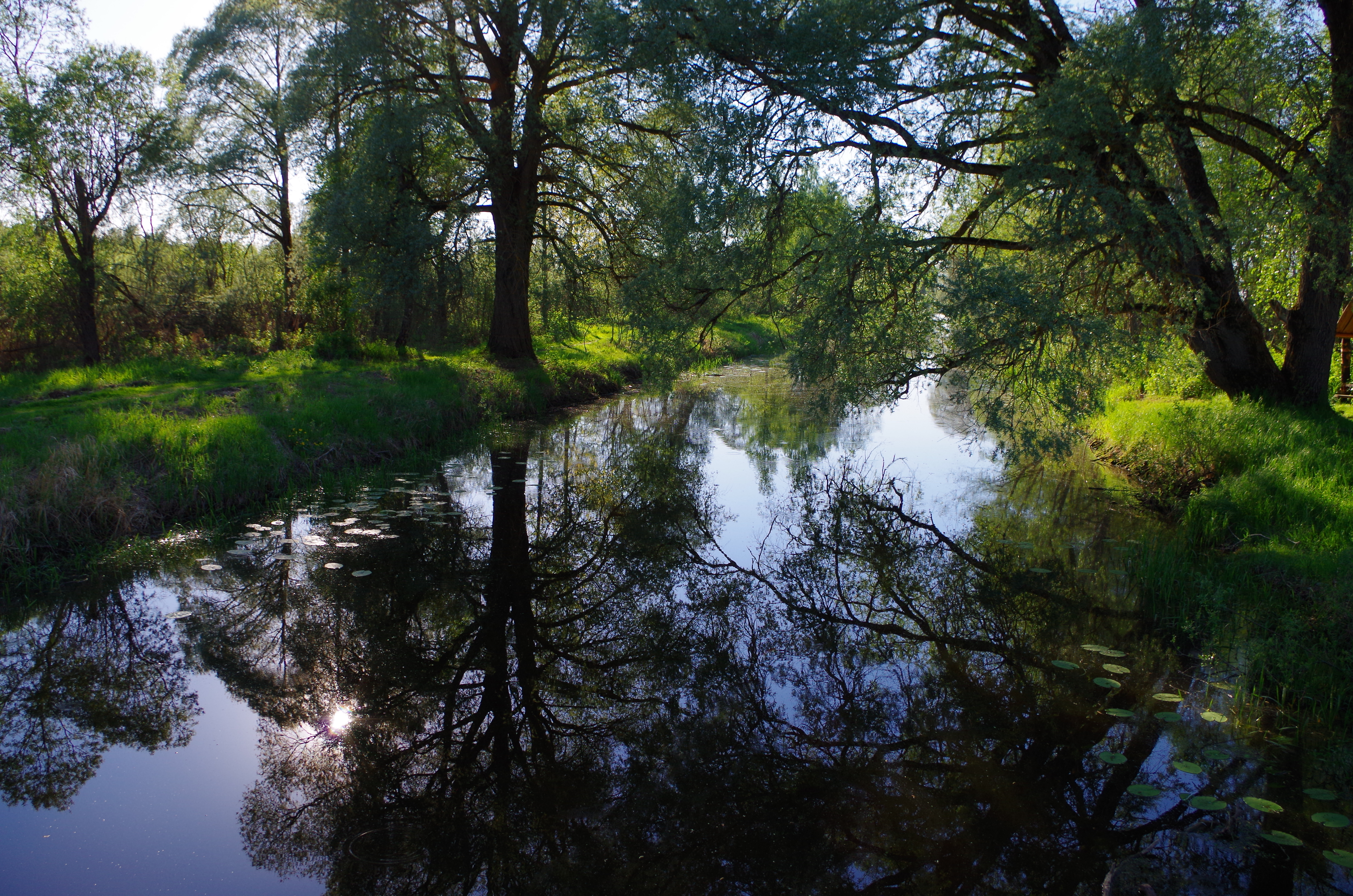 Ilmatsalu jõe alamjooks Emajõe lähedal